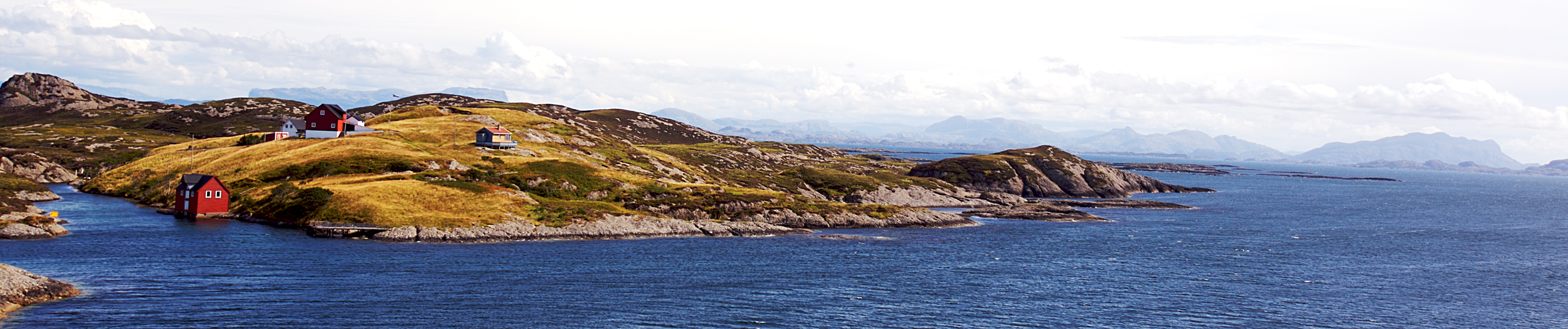 Bulandet, Askvoll